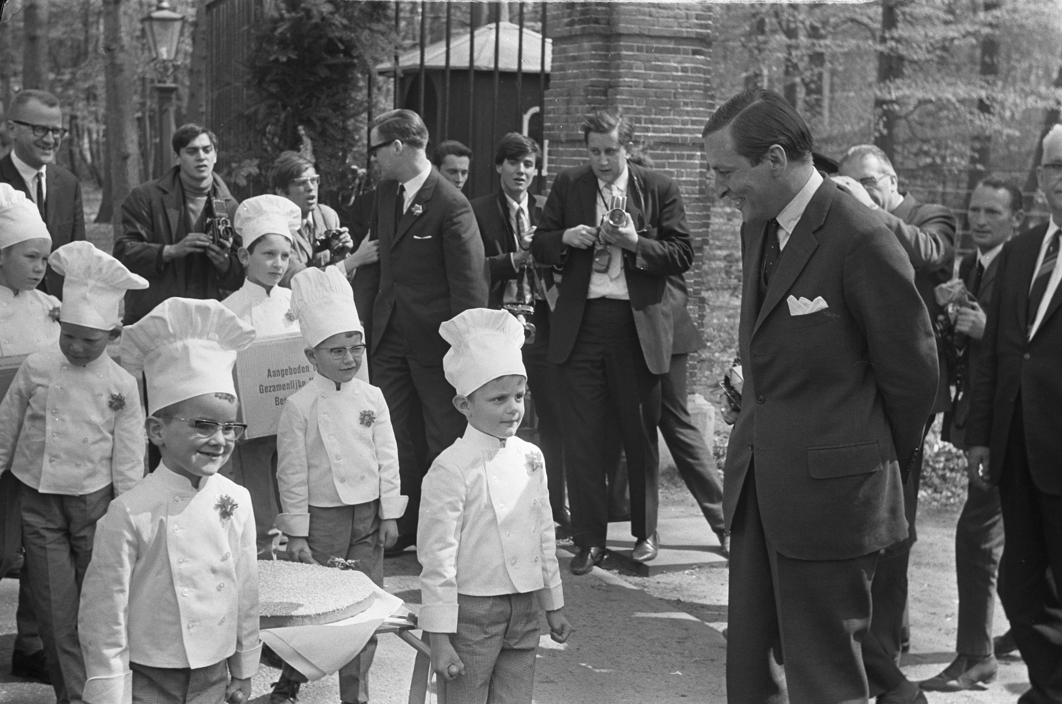 Collectie / Archief : Fotocollectie Anefo Reportage / Serie : Geboorte prins Willem-Alexander Beschrijving : Beschuit met muisjes voor prins Claus , de prins proeft de muisjes Datum : 28 april 1967 Trefwoorden : BESCHUIT, prinsen Persoonsnaam : Claus, prins Fotograaf : Koch, Eric / Anefo Auteursrechthebbende : Nationaal Archief Materiaalsoort : Negatief (zwart/wit) Nummer archiefinventaris : bekijk toegang 2.24.01.05 Bestanddeelnummer : 920-2797